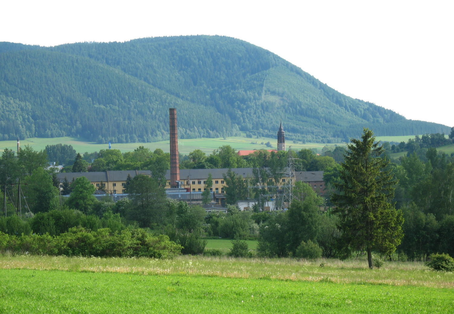 Lubawka (Liebau), Panorama